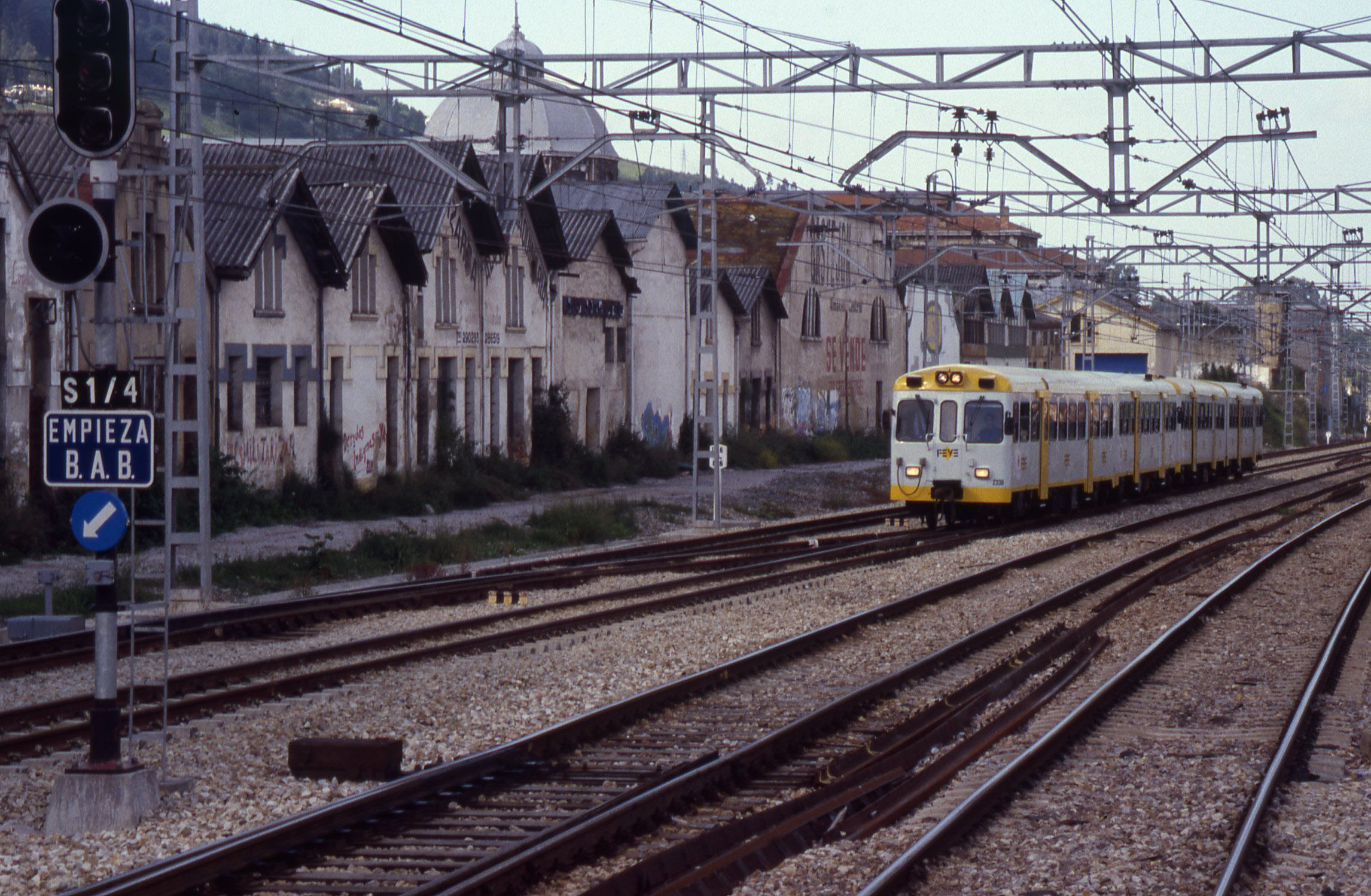 Een FEVE trein naast een breedspoor traject in de buurt van Oviedo.